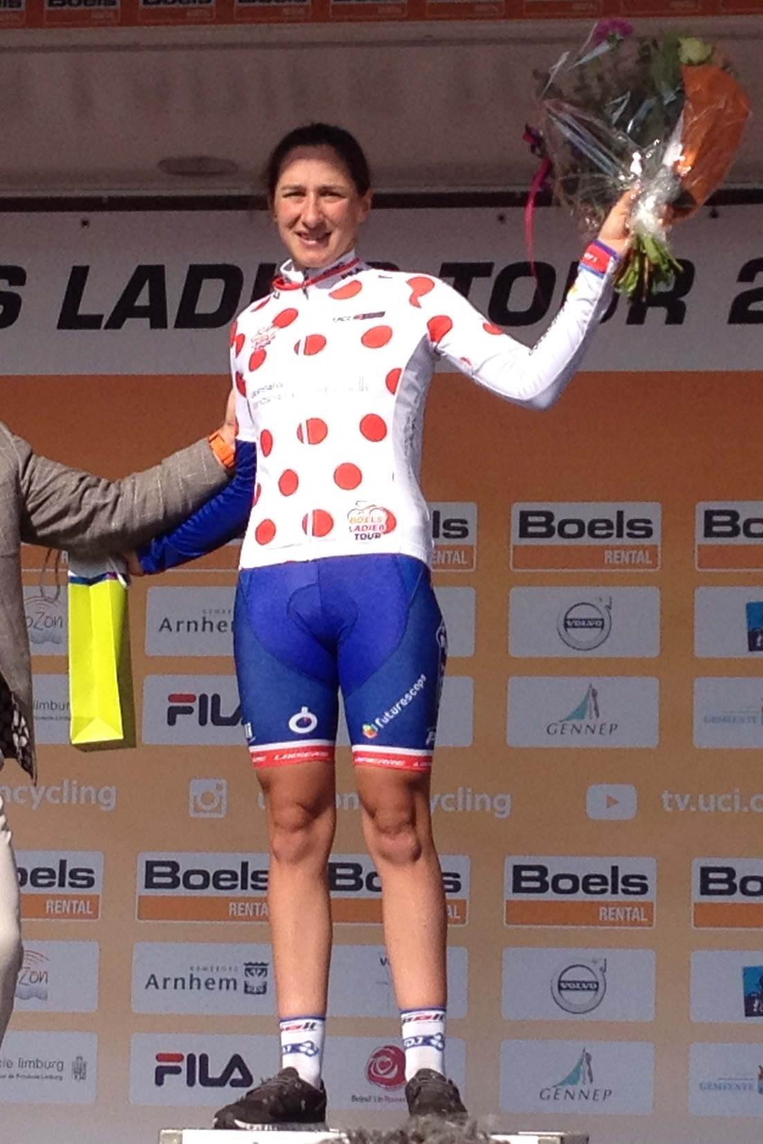 5e etappe van de Boels Ladies Tour 2018 door Zuid-Limburg, finish in Sittard op het Tom Dumoulin Bike Park. Eugénie Duval neem de bergtrui over.